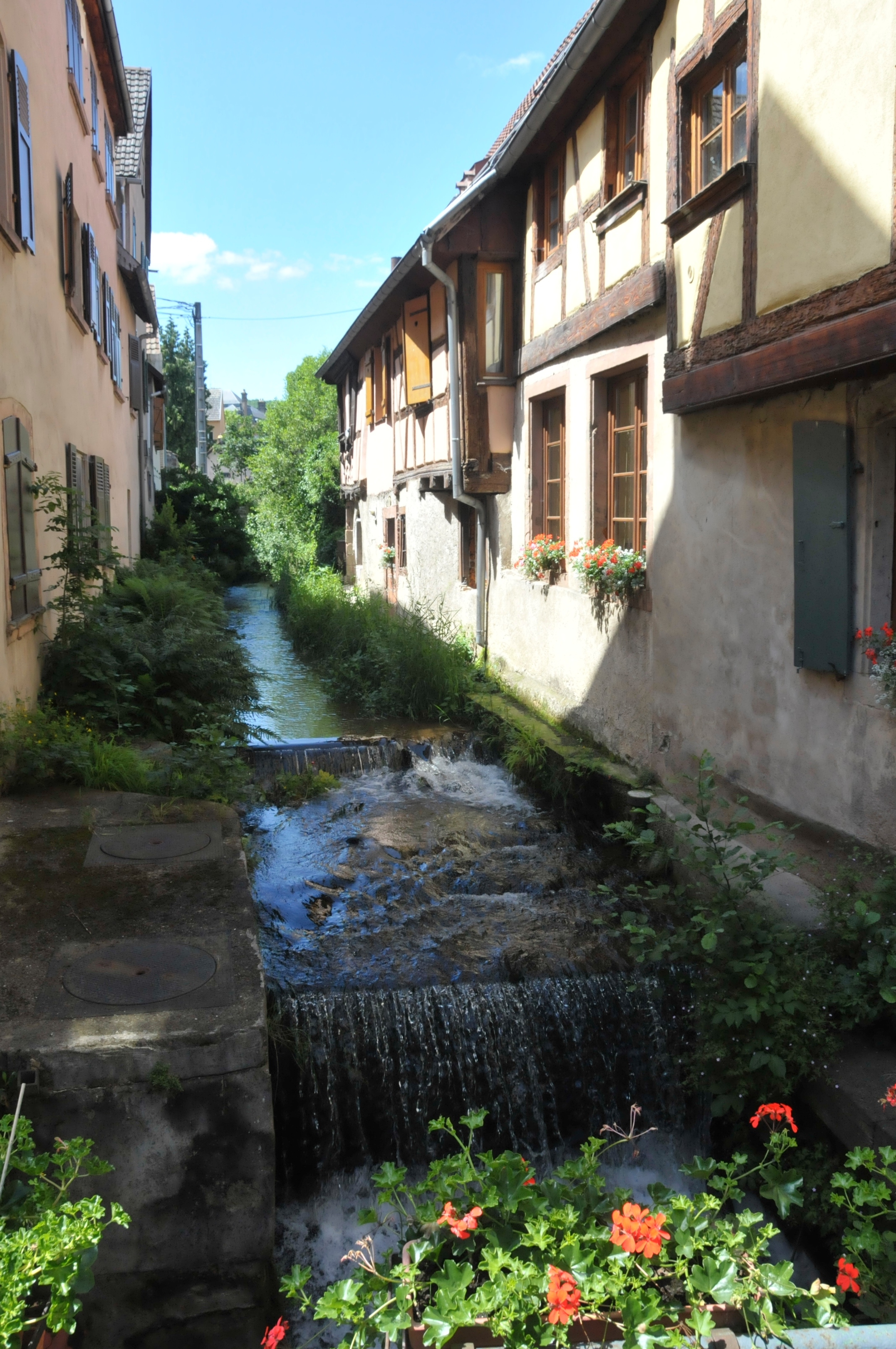 Barr (Elsass), die Kirneck kurz vor Eintritt in den unterirdischen Kanal